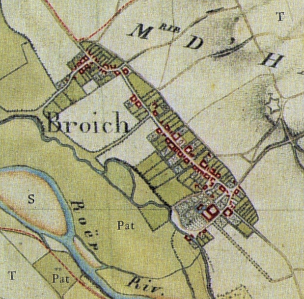 Der Jülicher Stadtteil Broich auf einem Ausschnitt der Tranchotkarte